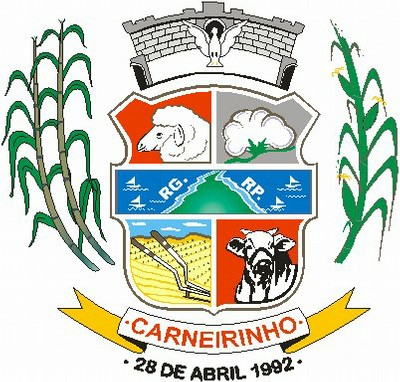 Brasão de armas do município de Carneirinho, MInas Gerais, Brasil.